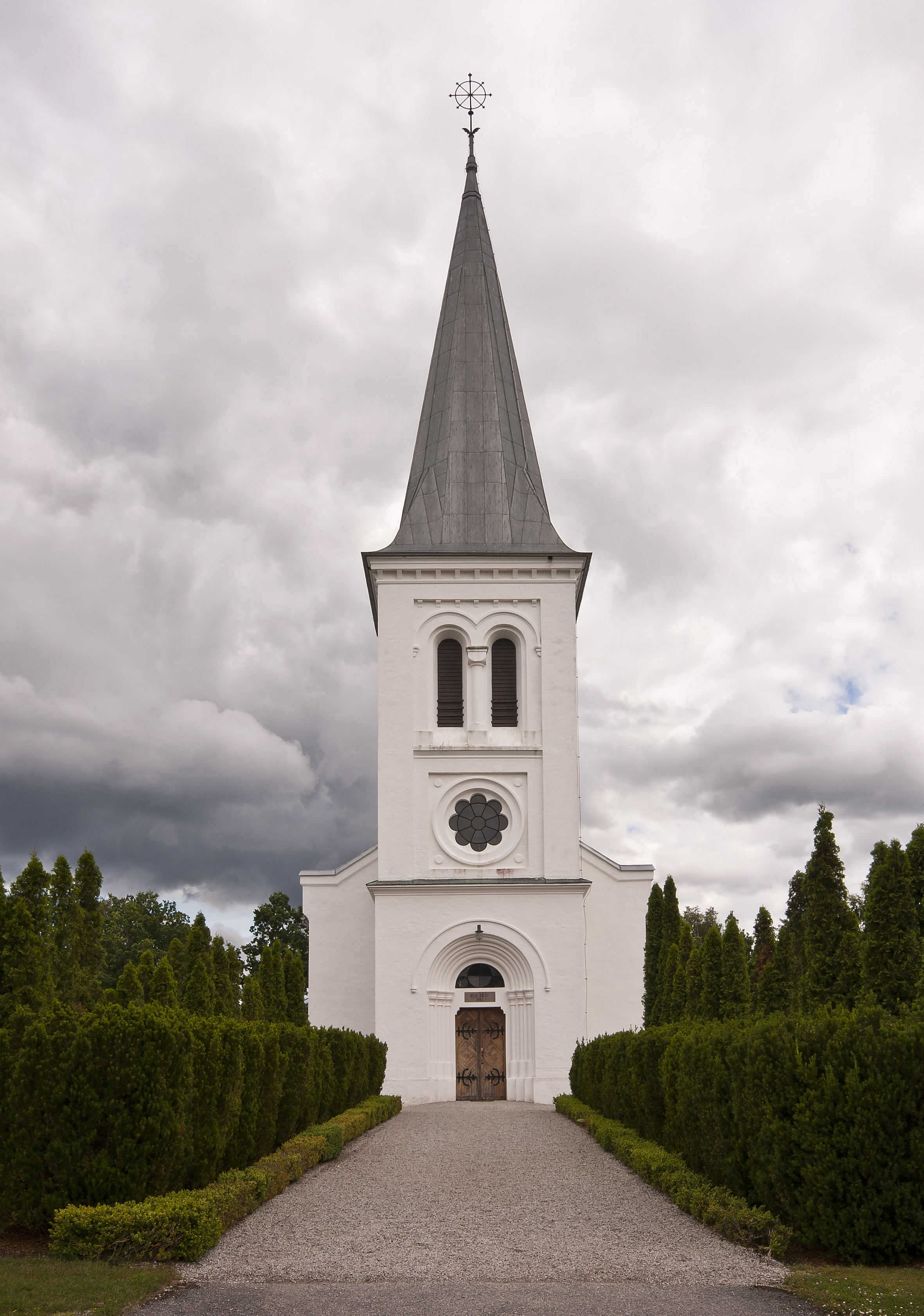 Munkarps kyrka